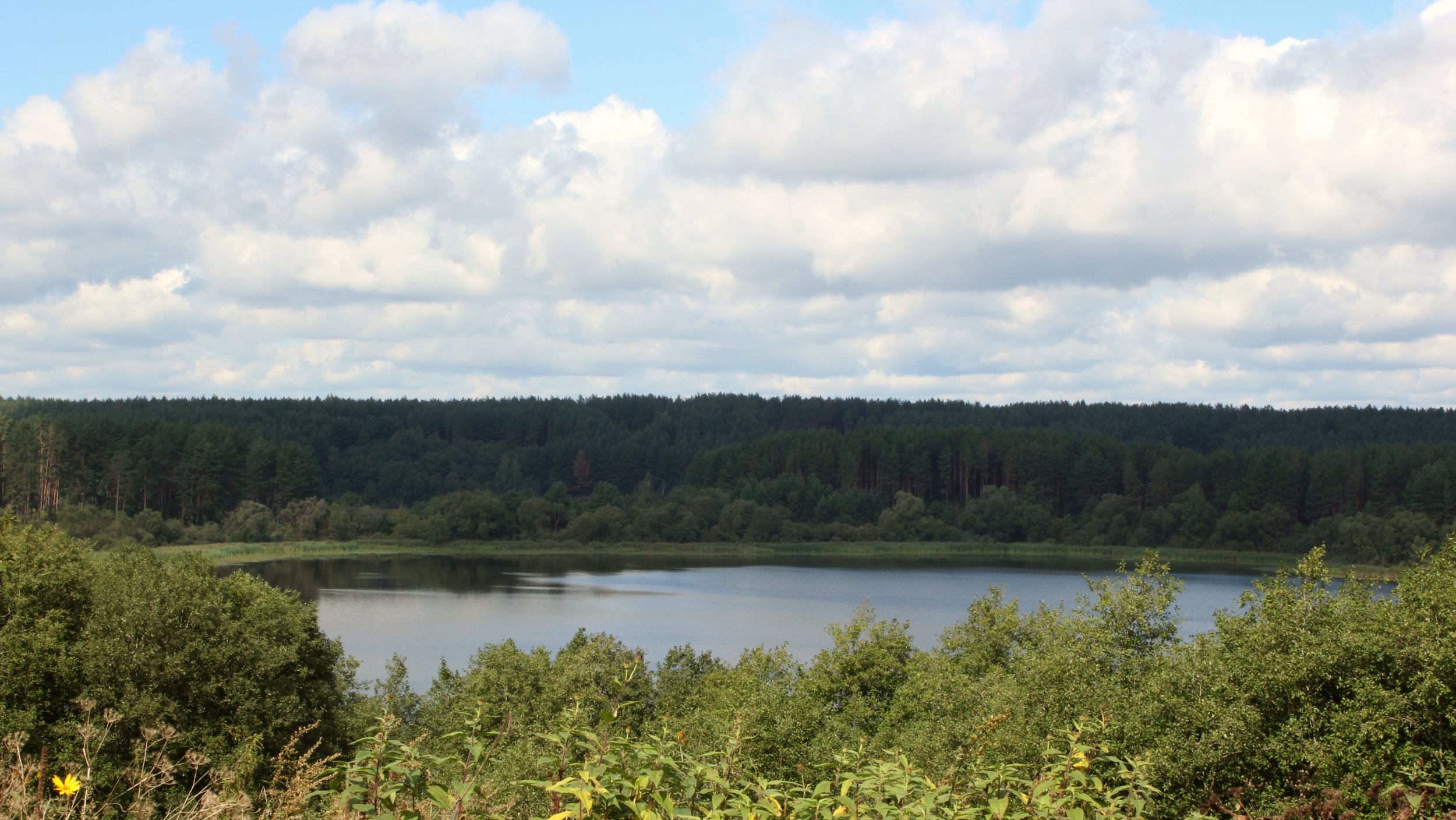 Выгляд на возера Лугавое ў г. Гарадок. Канец вул. Камсамольскай.